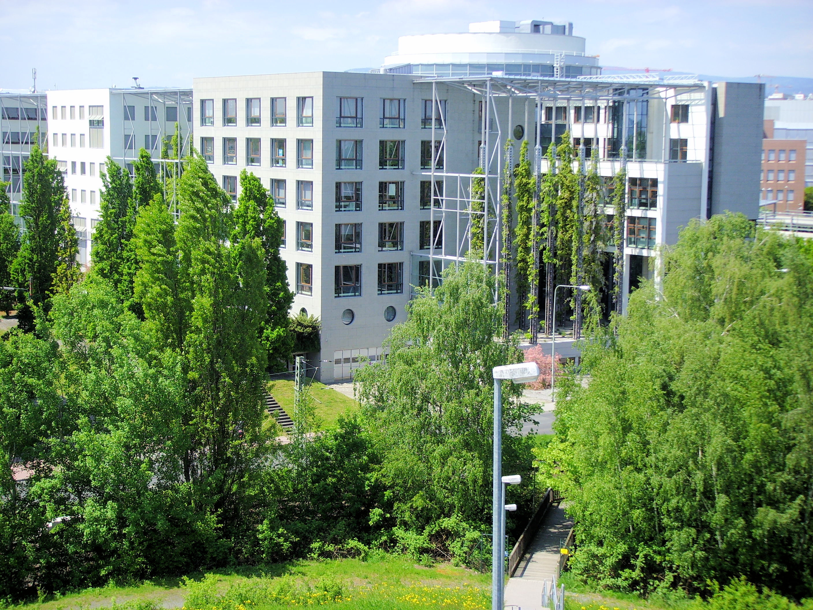 "Haus der Baugewerkschaft", Olof-Palme-Straße 19, D-60439 Frankfurt am Main: Sitz des Bundesvorstands der IG Bauen-Agrar-Umwelt